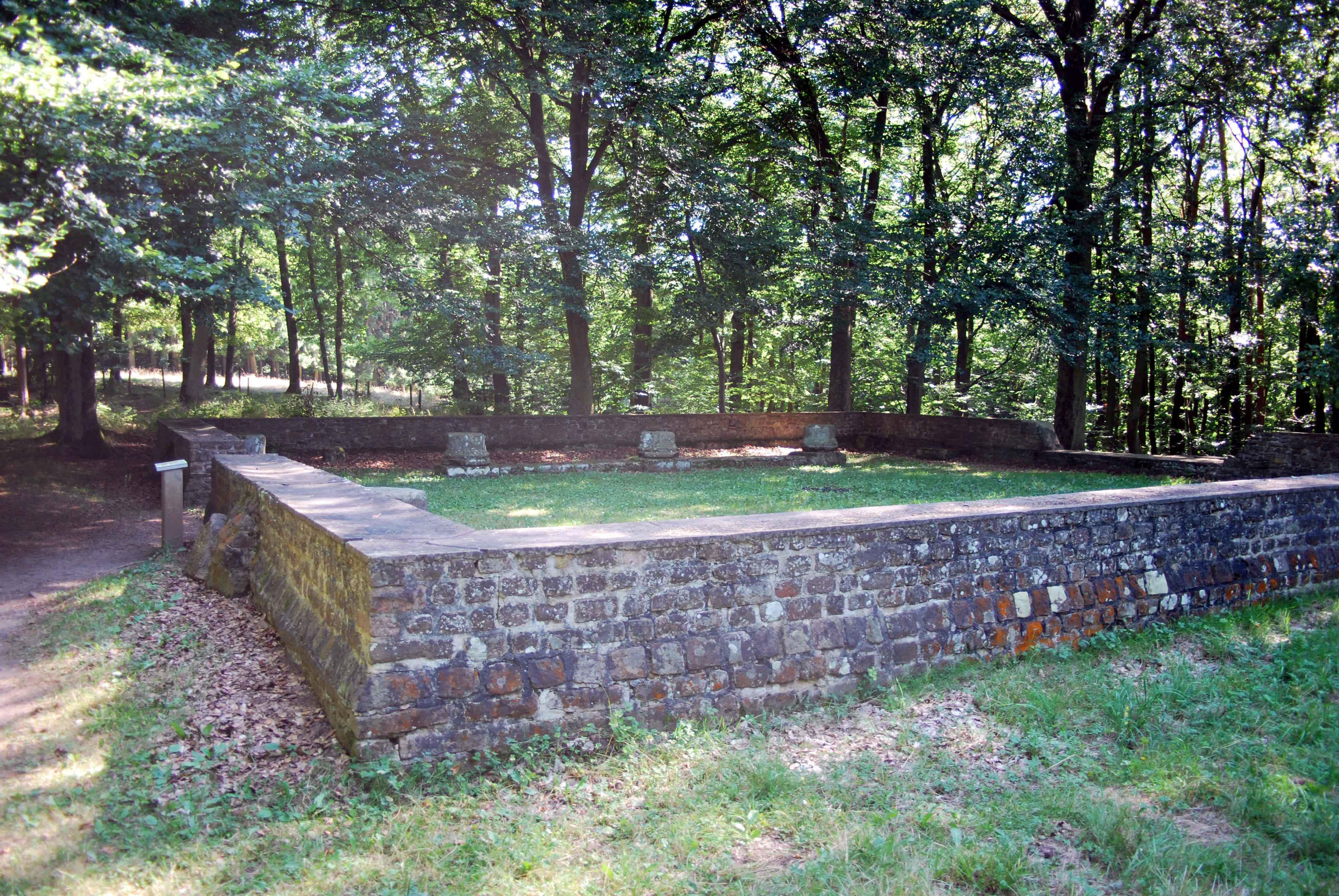 Basilika am gallorömischen Umganganstempel von Nöthen.